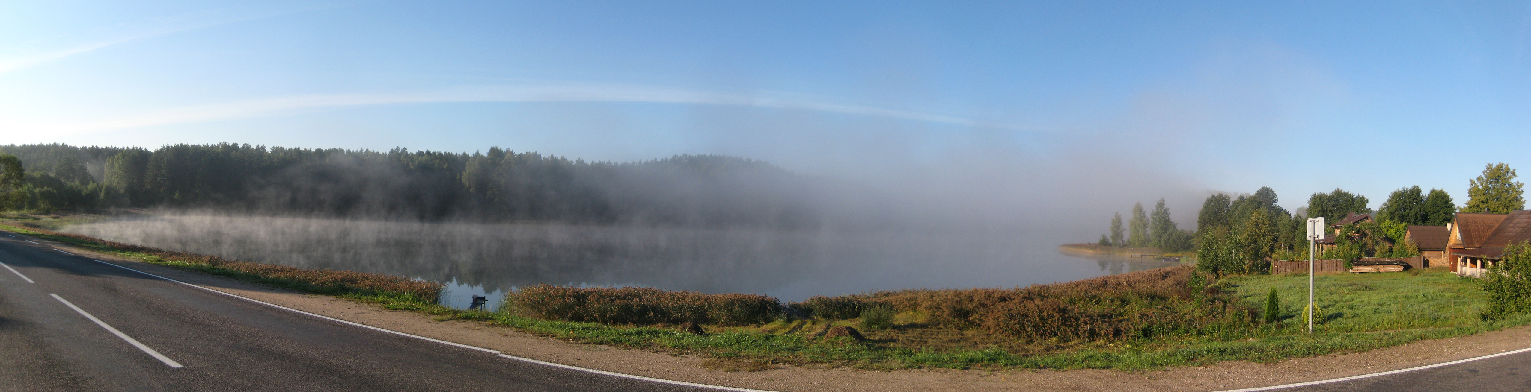 Degučiai, Lithuania